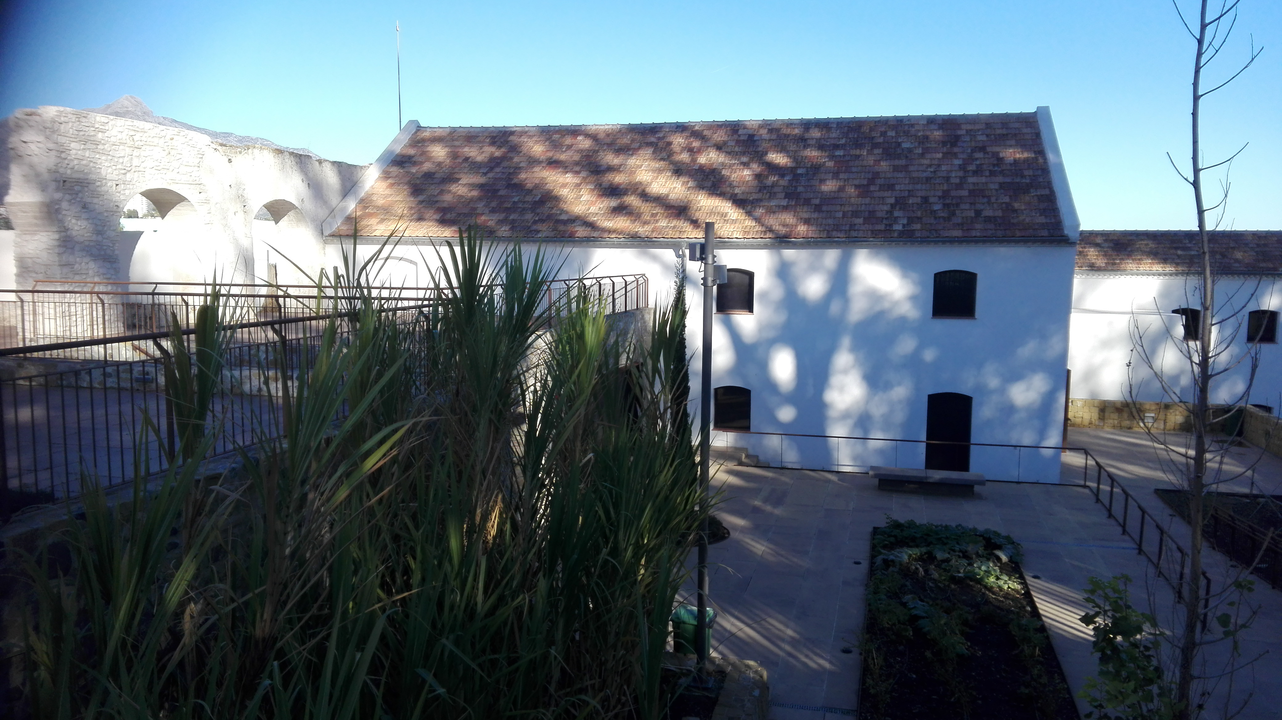 Vista desde el lateral del edificio.